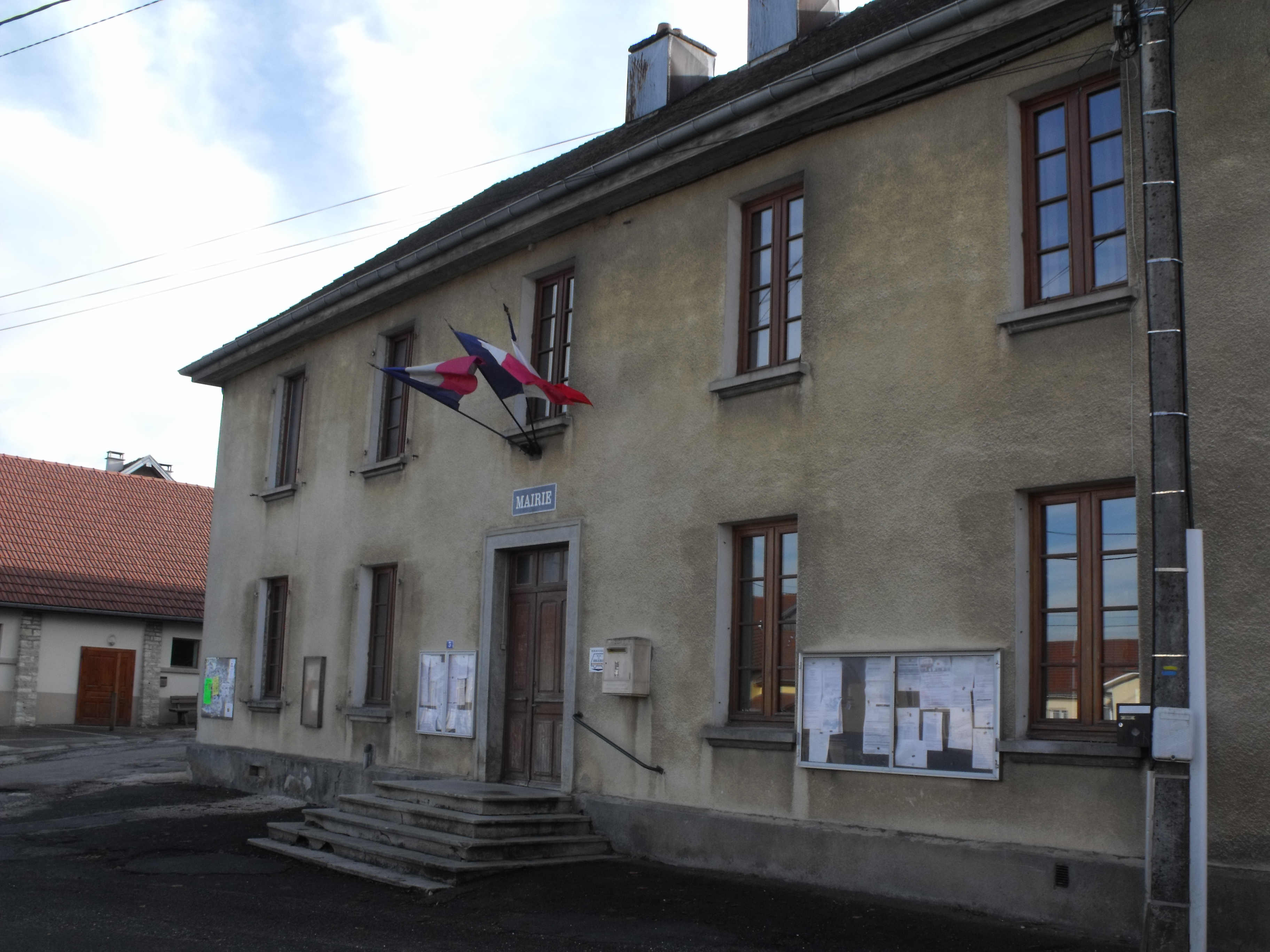 Mairie d'Ecot, Doubs, France